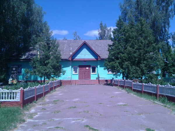 Зведене в 80-х роках ХХ столітя